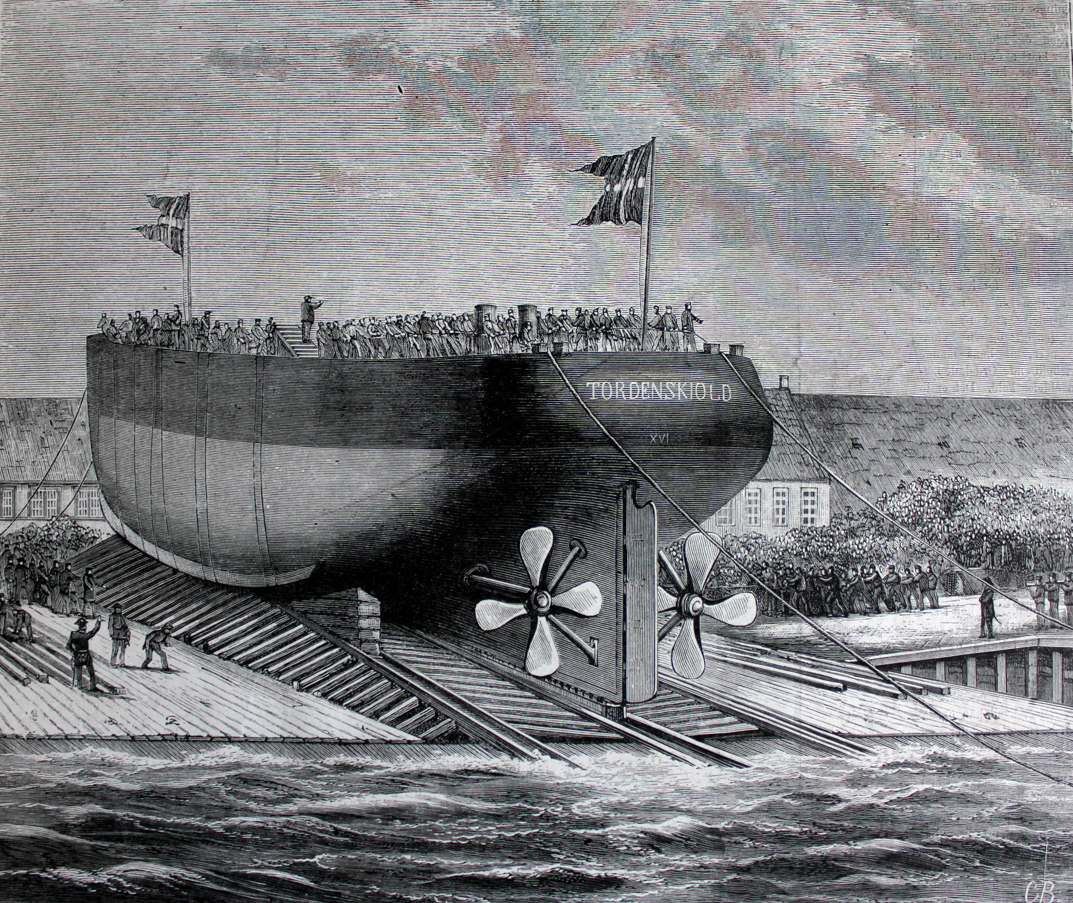 Fra Illustreret Tidende den 31. oktober 1880. Original billedtekst: Torpedoskibet "Tordenskjold" løber af Stabelen den 30. September 1880.